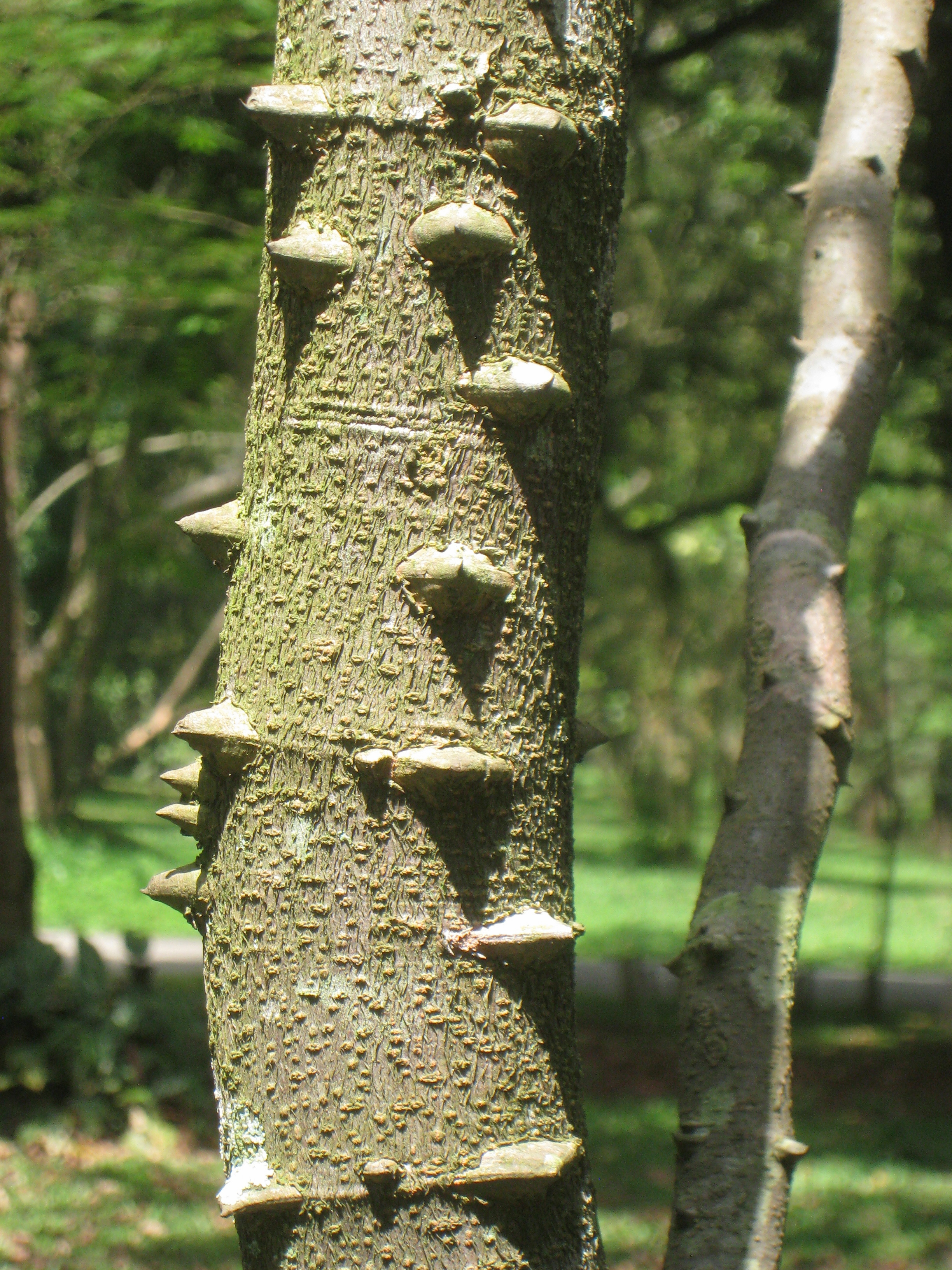 Caesalpinia echinata in the Jardim Botânico de São Paulo, São Paulo City, SP, Brazil.